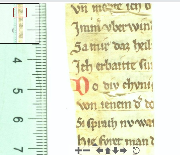 Fragment des König Rother in Los Angeles